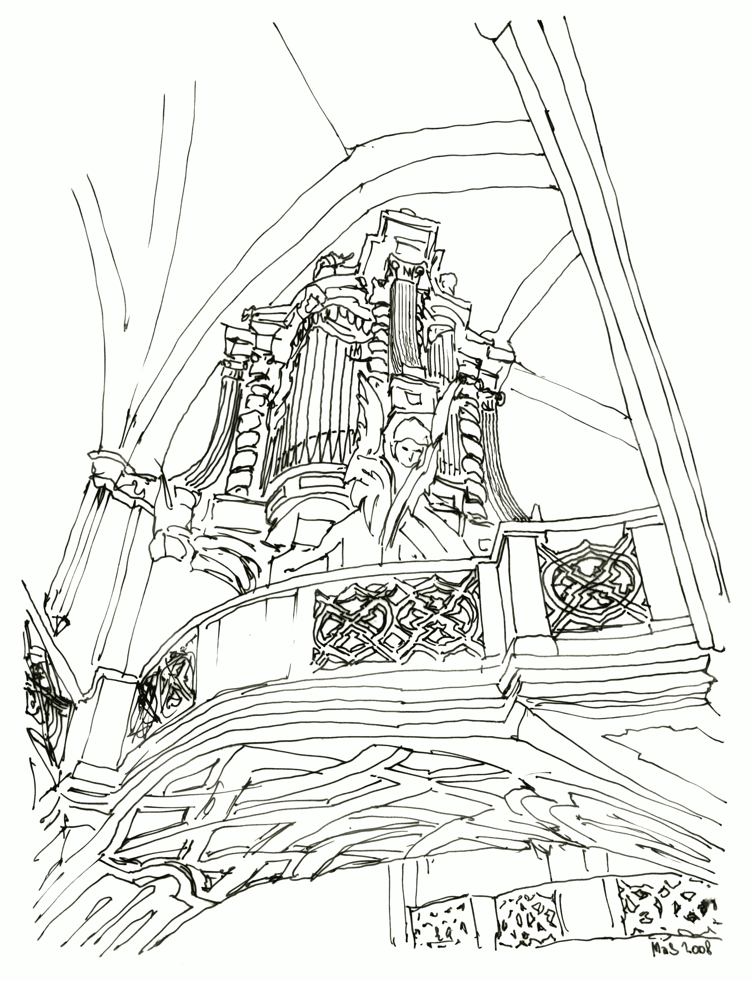 varhanní kruchta s Varhanami v klášterním kostele ve Žďáru nad Sázavou